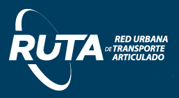 Logo Oficial